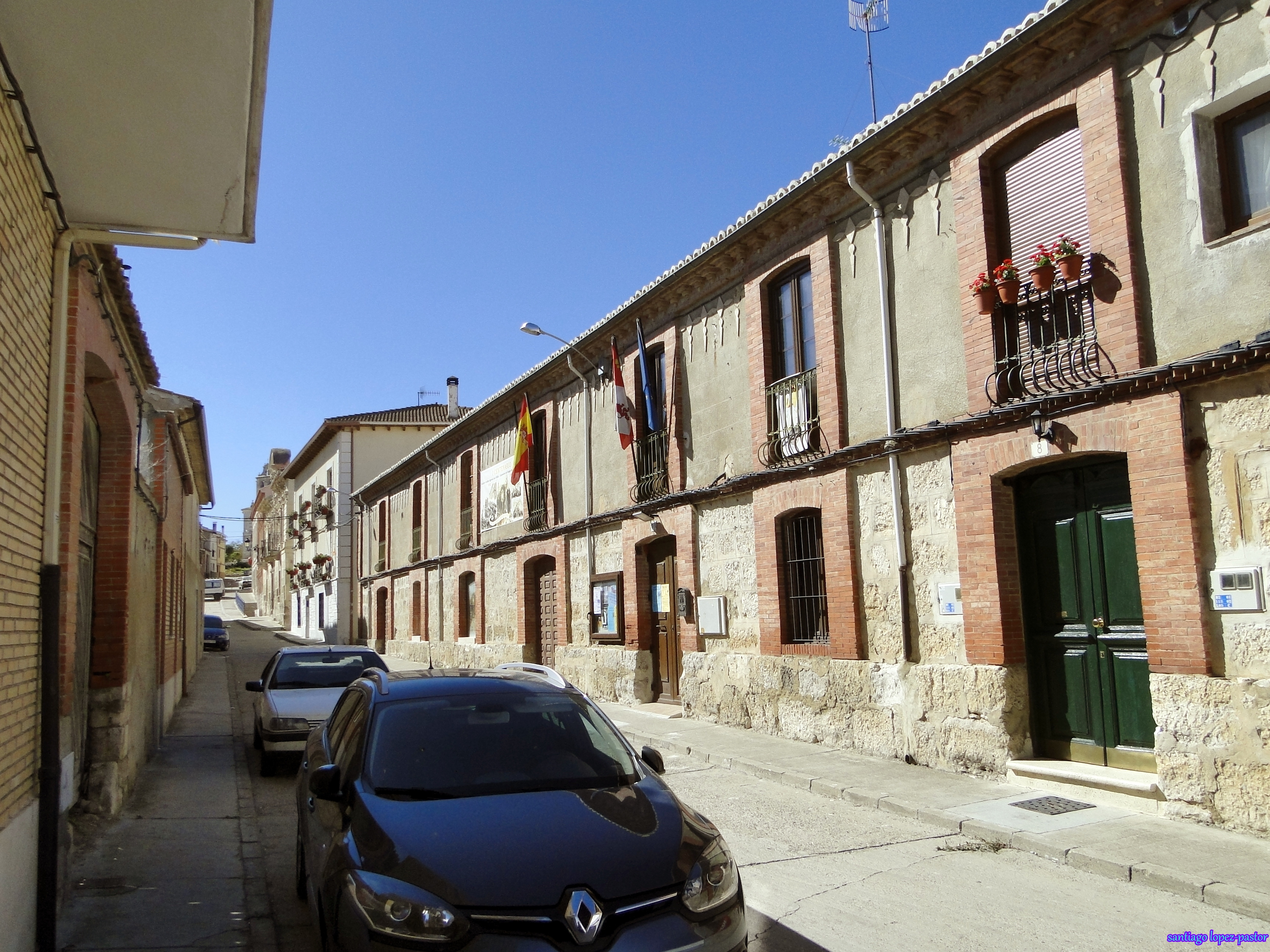 Baltanás